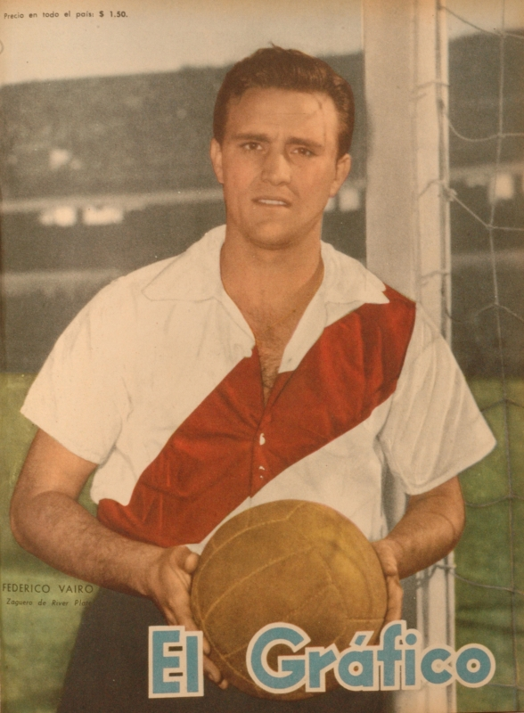 Federico Vairo en la tapa de la revista El Gráfico